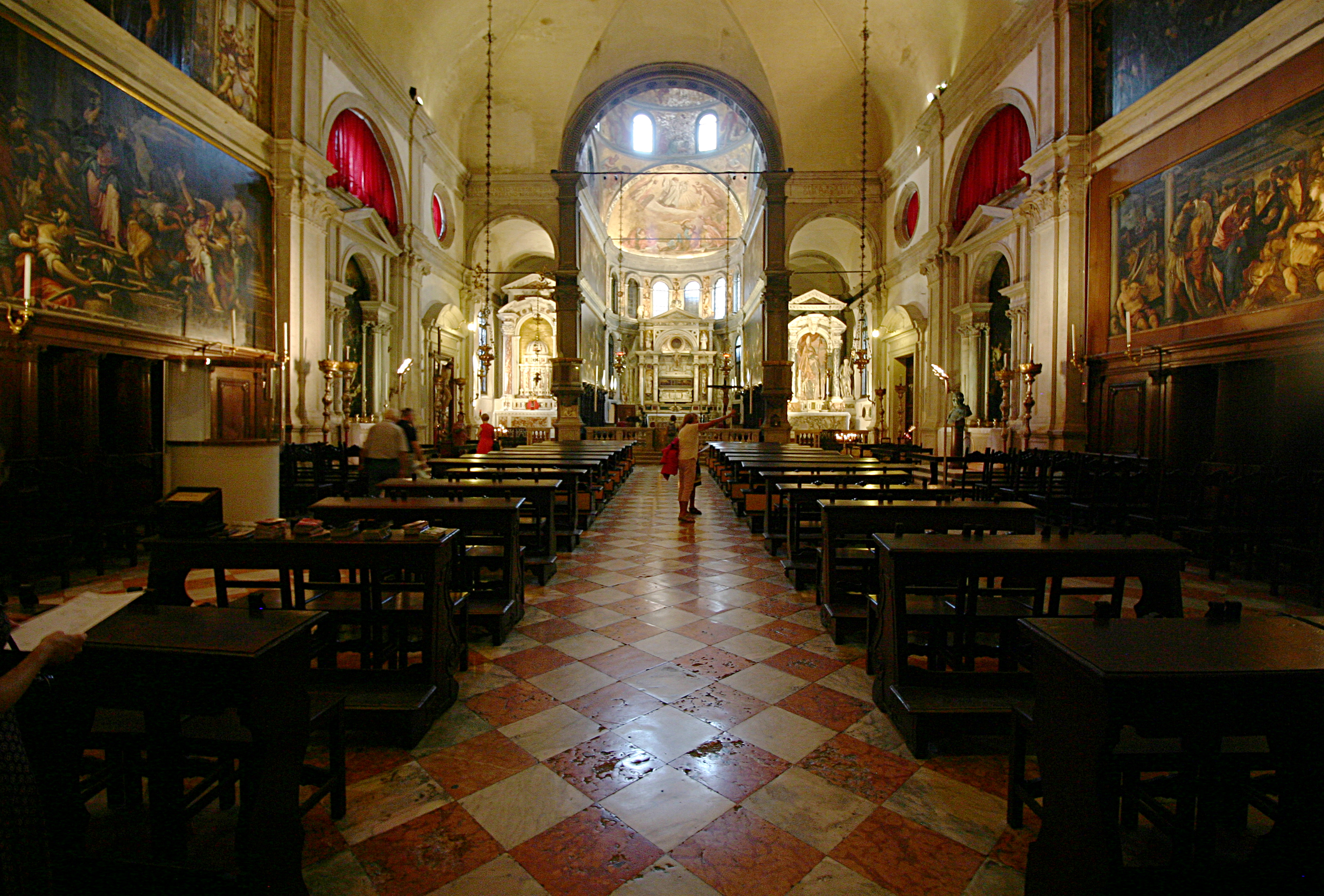 San Rocco - Venice